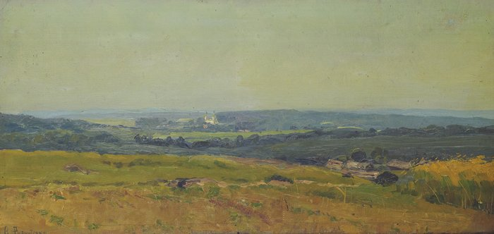 Картина «Літній пейзаж. Поле за селом.» Кінець 1900-х - 1910-і роки. 24,7 × 50,7 см.